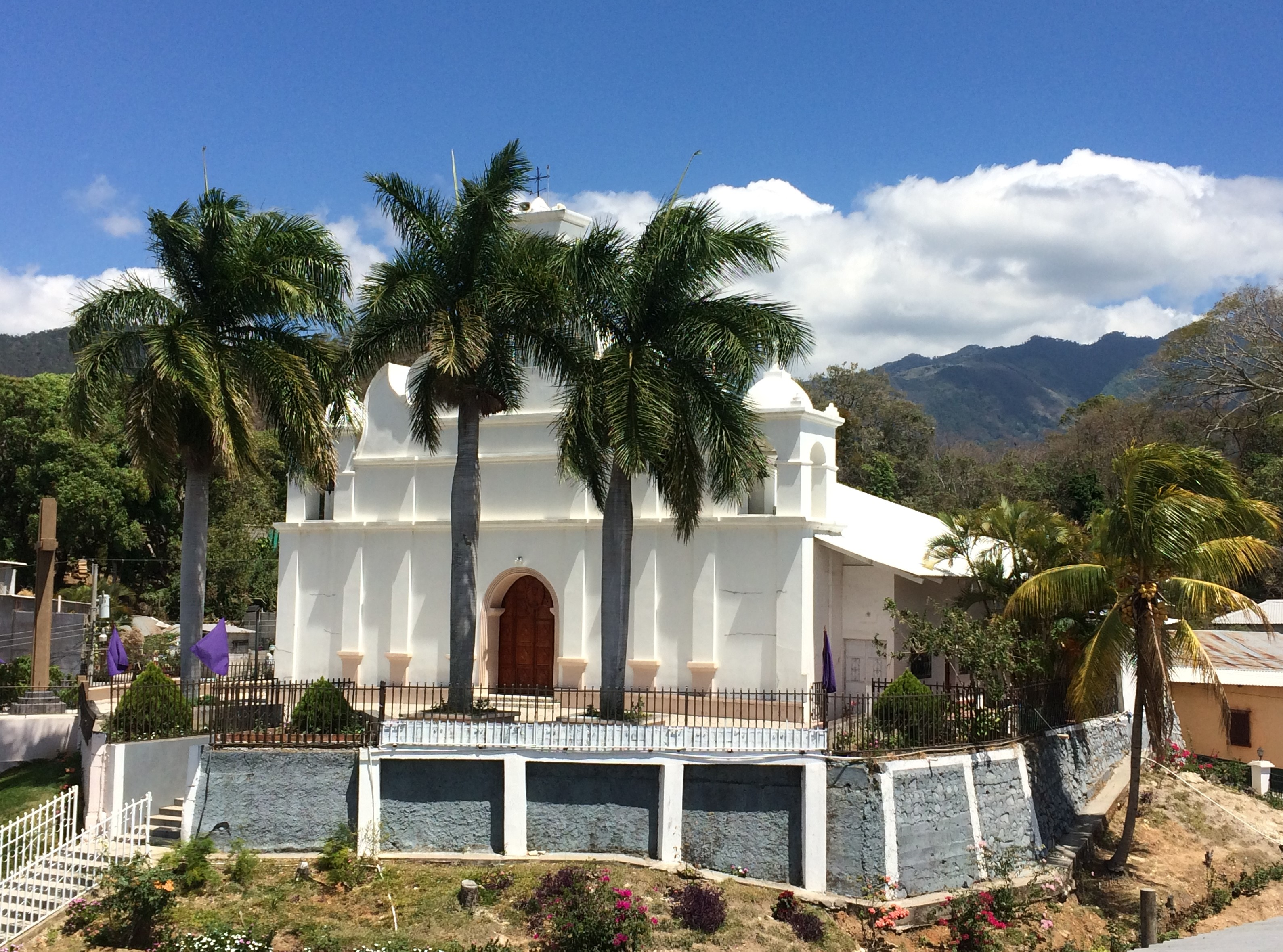 Templo Parroquial de Concepción las Minas